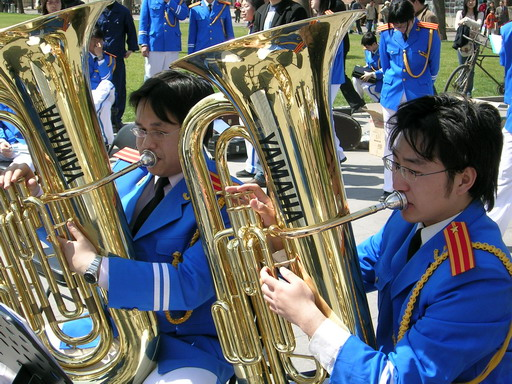 两位大号手。